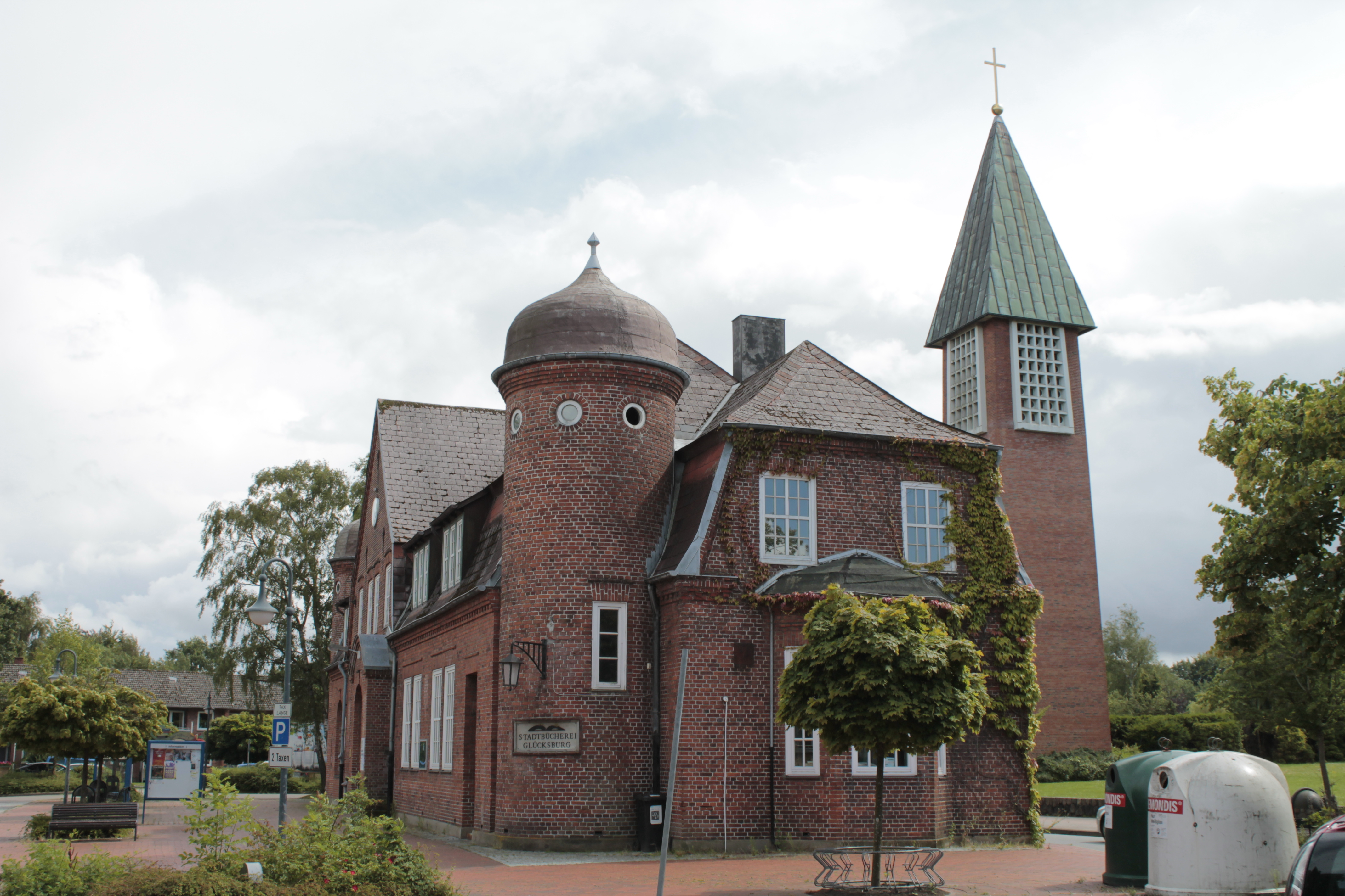 Stadtbücherei in Glückburg (Ostsee), ehemaliger Bahnhof der Flensburger Kleinbahn; Der Turm im Hintergrund gehört zur örtlichen Kirche.